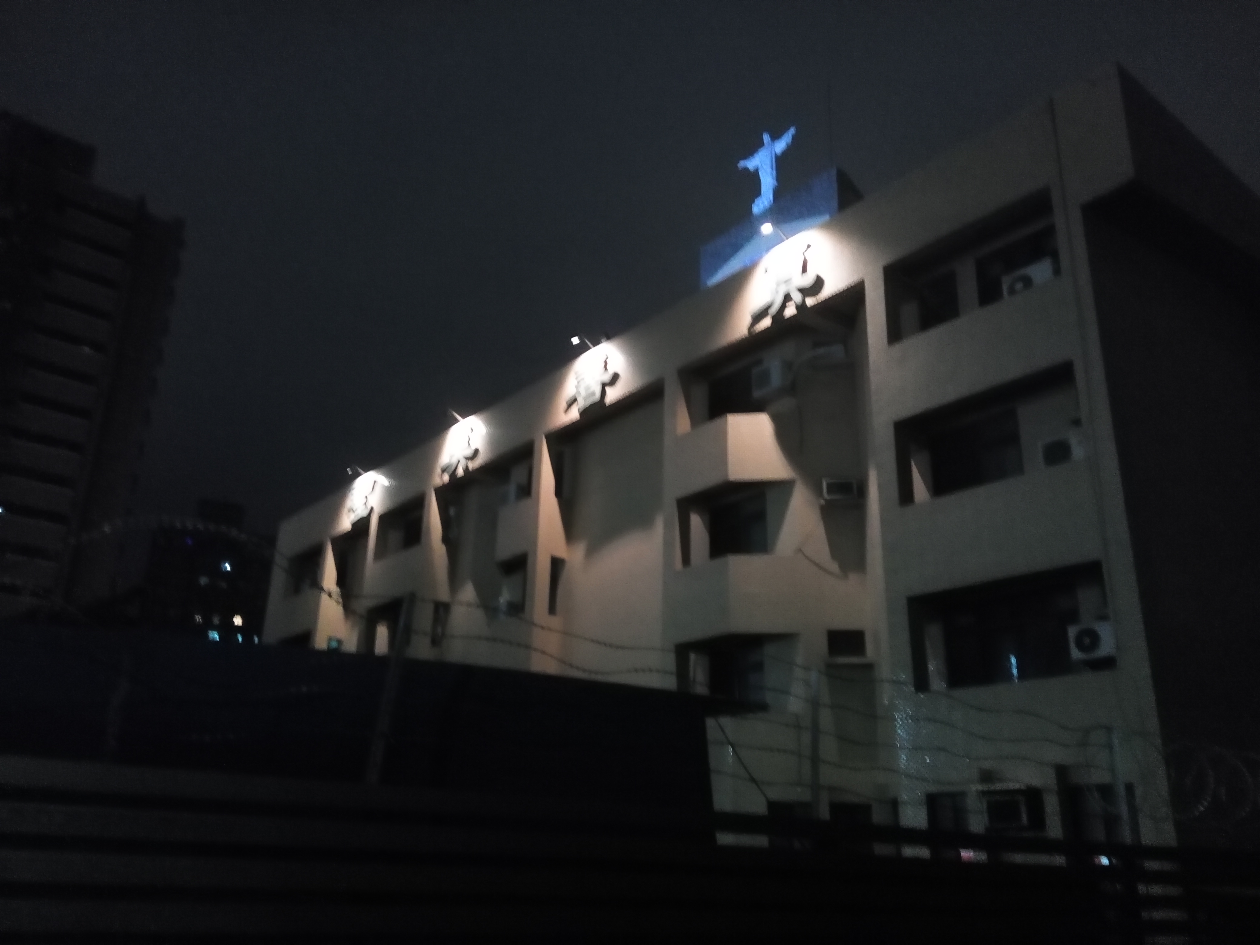 恆毅中學夜晚。真善美聖四字校訓。